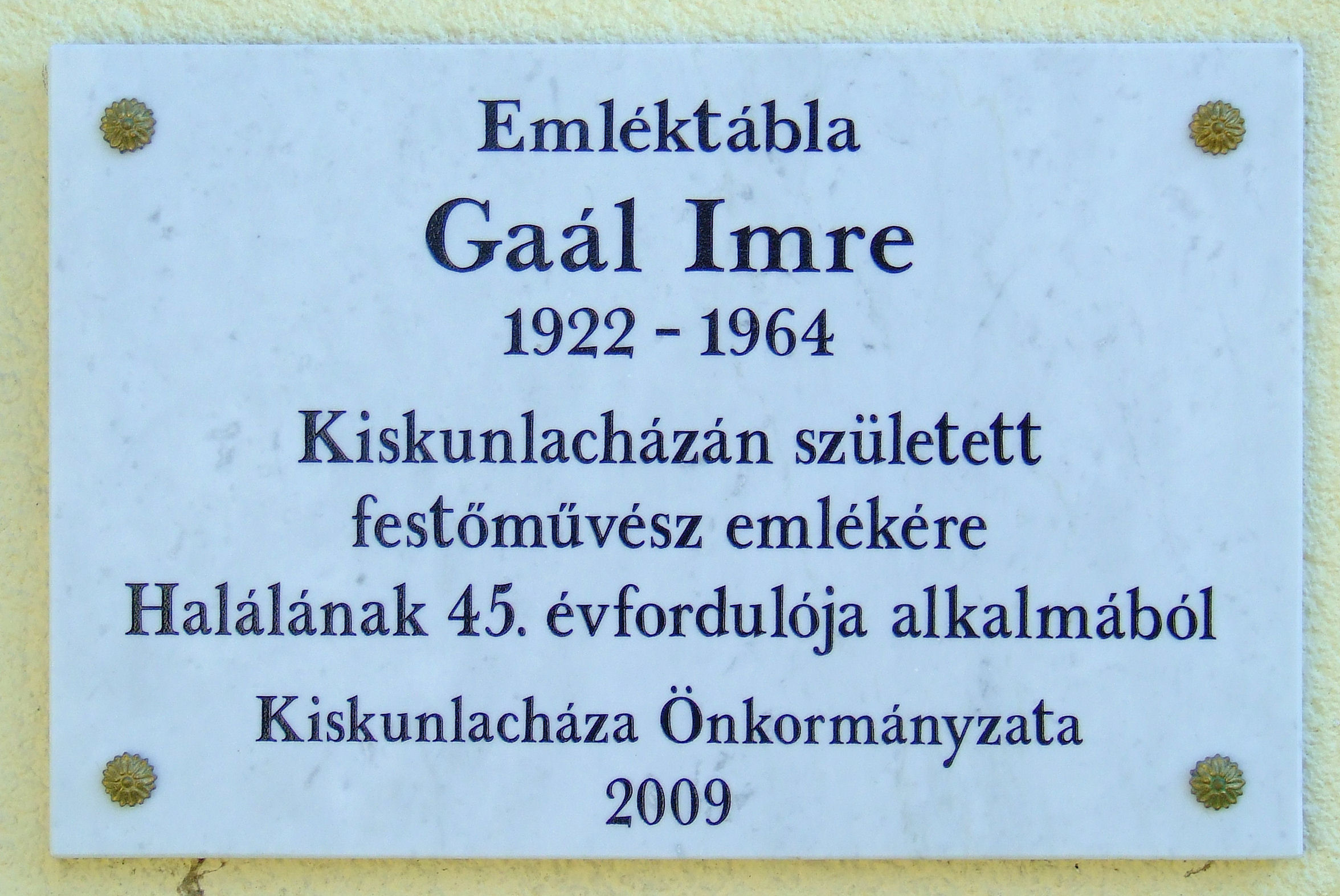 Gaál Imre festőművész emléktáblája Kiskunlacházán